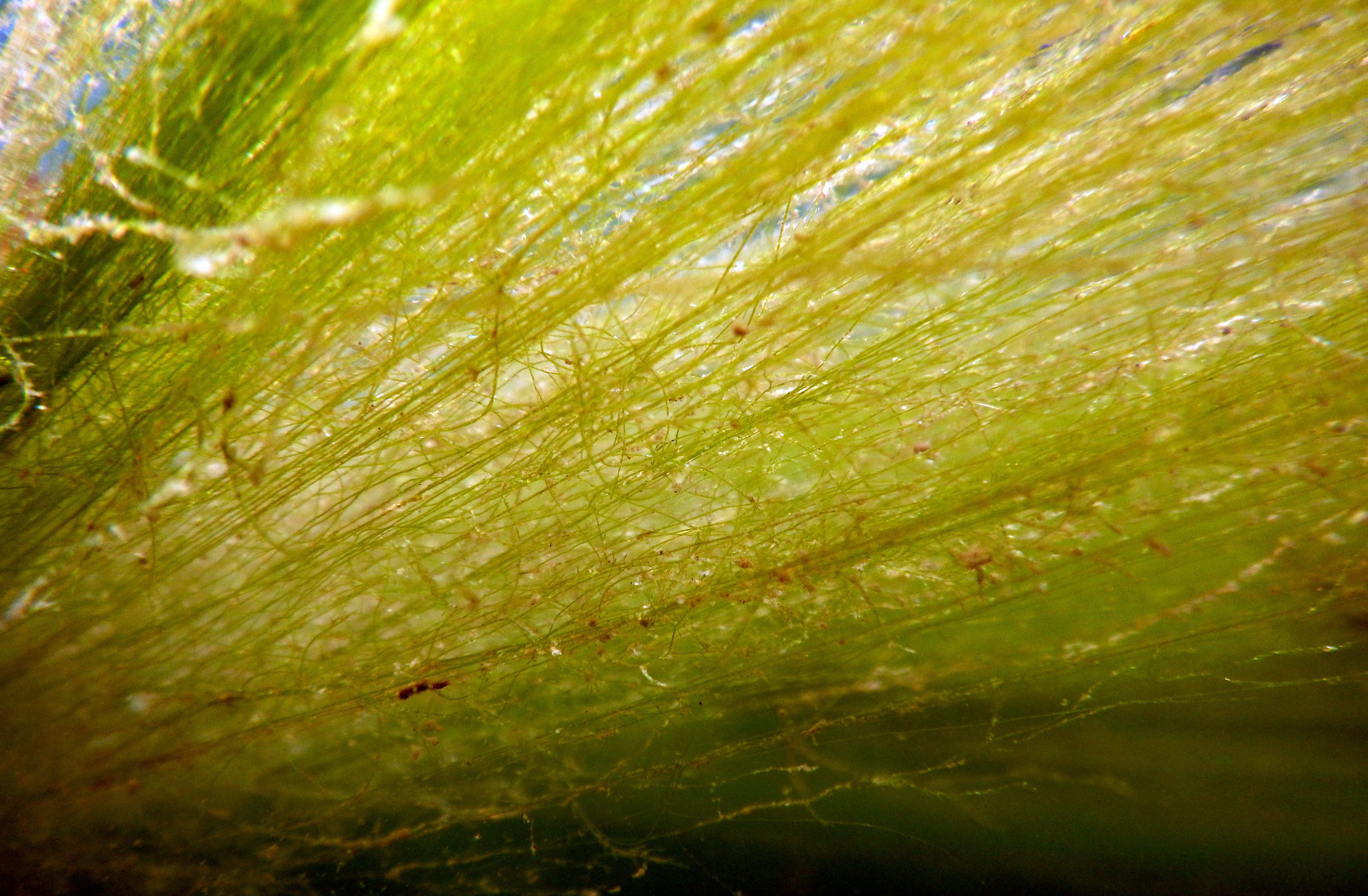 Filamenteuses vertes (vue de dessous)